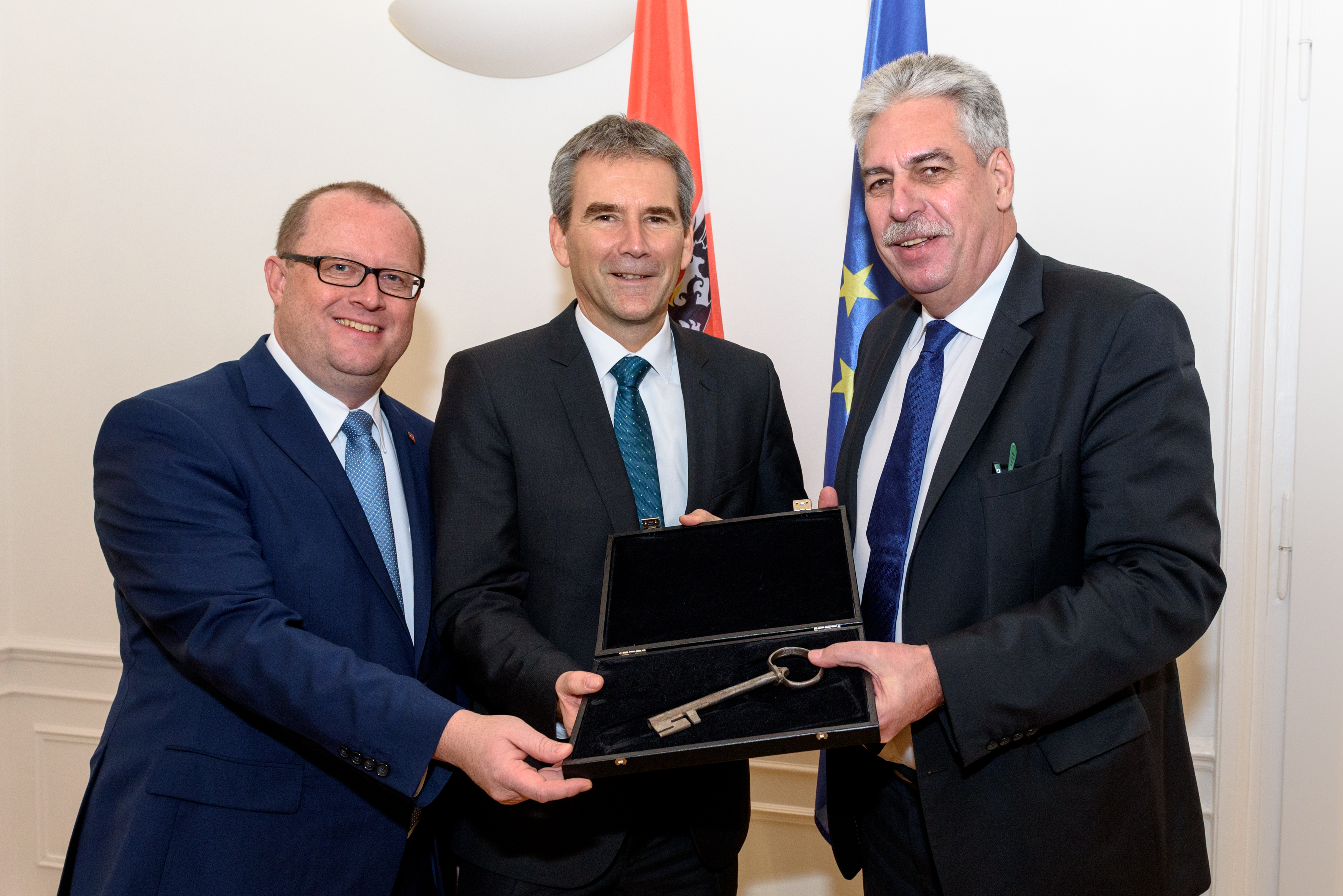 18.12.2017. Amtsübergabe im Finanzministerium von Dr. Hans Jörg Schelling an den neuen Finanzminister Hartwig Löger und Staatssekretär Hubert Fuchs. Quelle/Copyright (c): BMF/Bruckberger